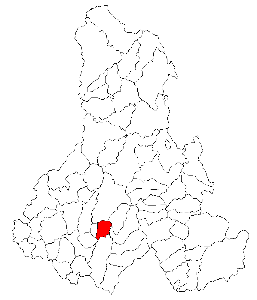 Categorie:Hărţi ale judeţului Harghita Contents 1 Licensing 2 Sursă 3 Licensing 4 Original upload log Licensing Sursă ro::Imagine:Harta_jud_Harghita.png